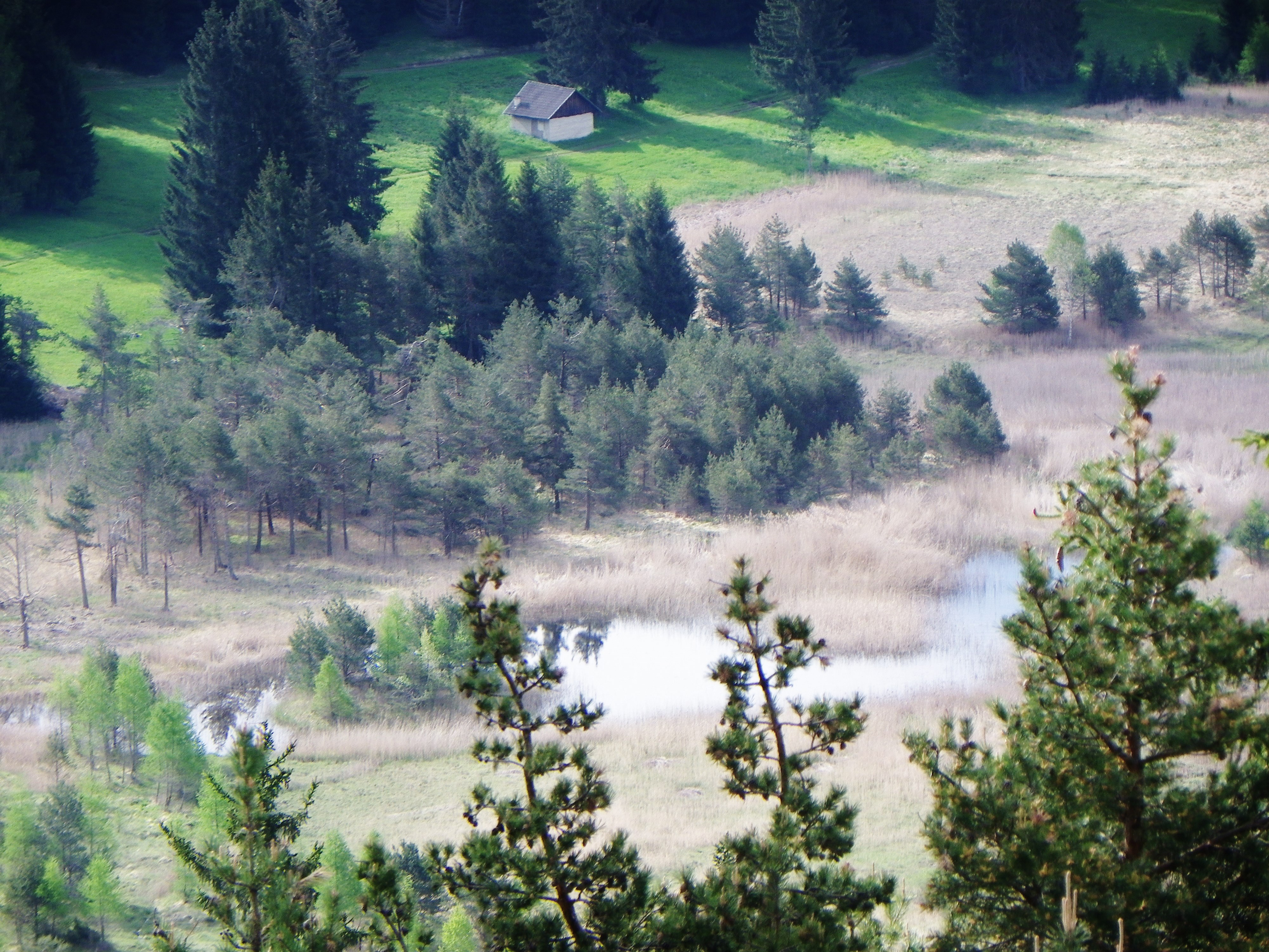 Laghetto delle Regole di Castelfondo (TN) m 1240 slm